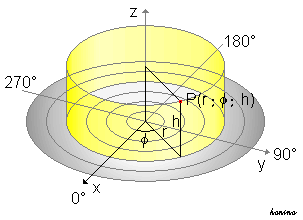 Zylinderkoordinaten GFDL gezeichnet von Honina 22:27, 14. Jun 2004 (CEST)